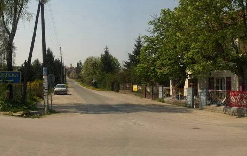 Gračec - Direction to Brckovljani